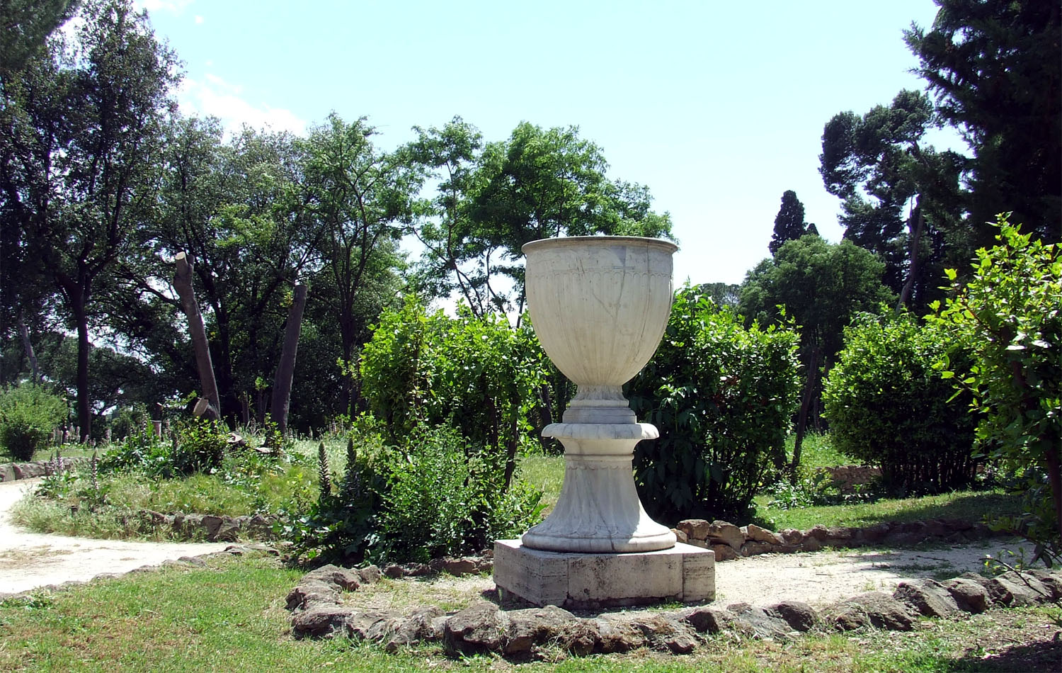 Villa Celimontana, Roma - La "coppa"